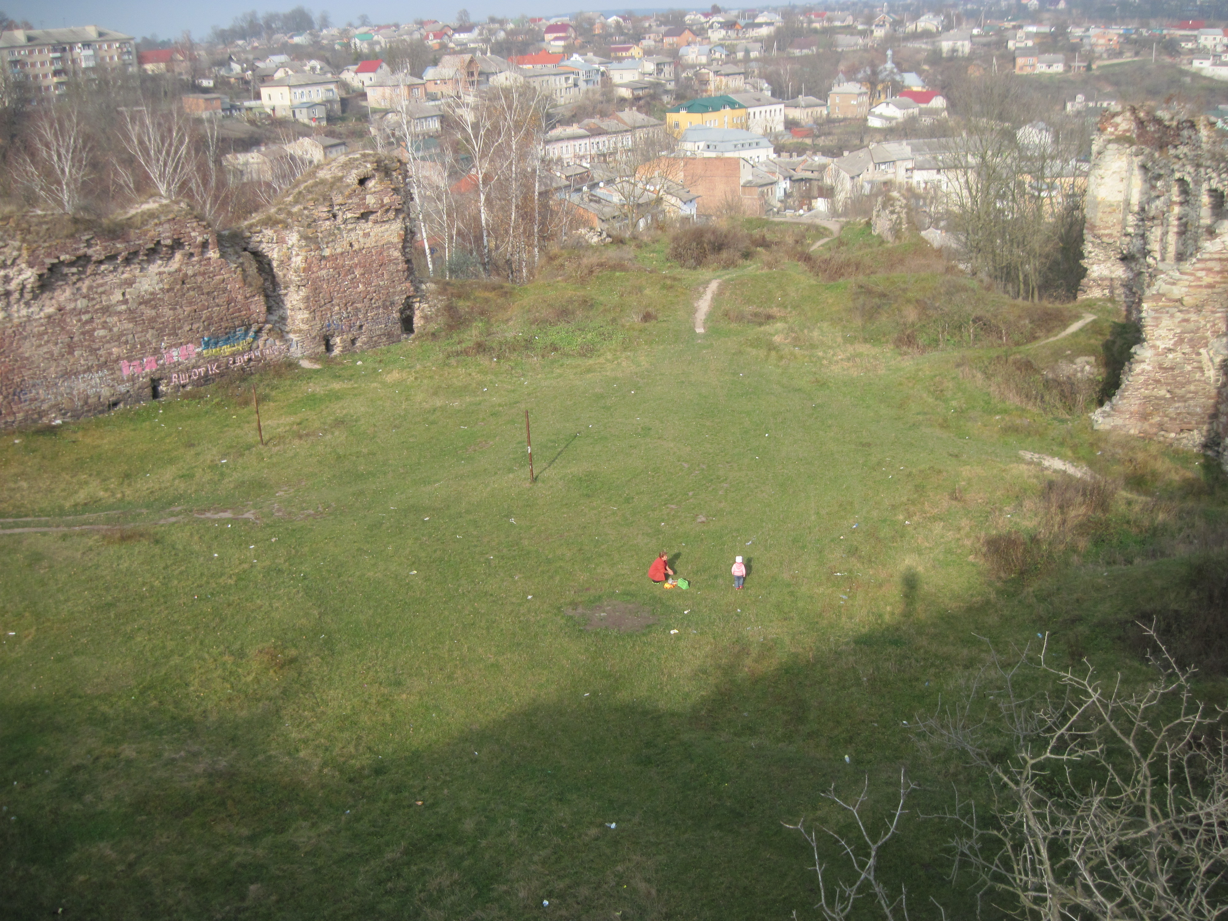 Внутрішній двір, осінь 2013